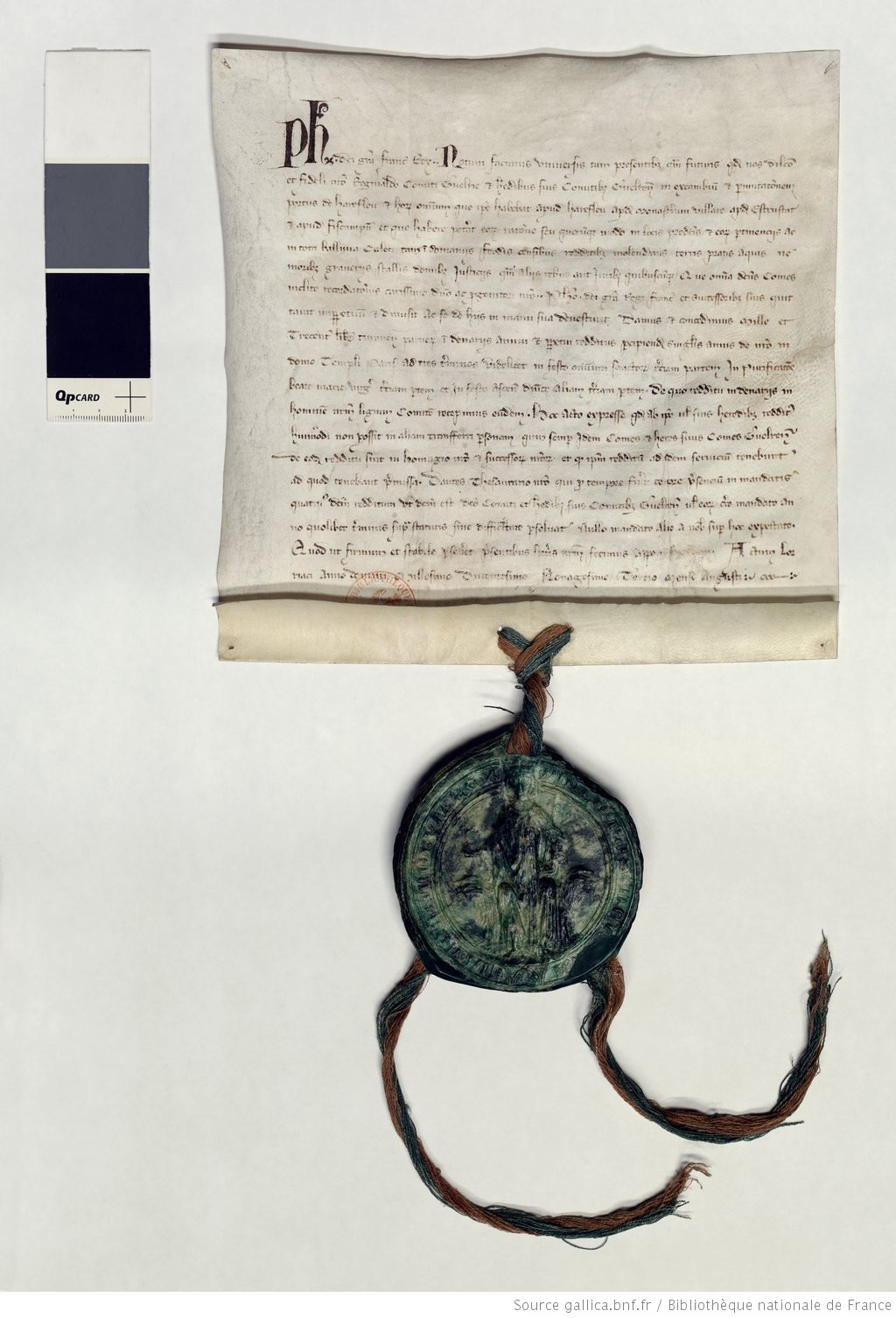 Acte de possession de Harfleur, Montivilliers, Etretat, Fécamp et Lorris au comte de Gueldre en 1293 - BNF